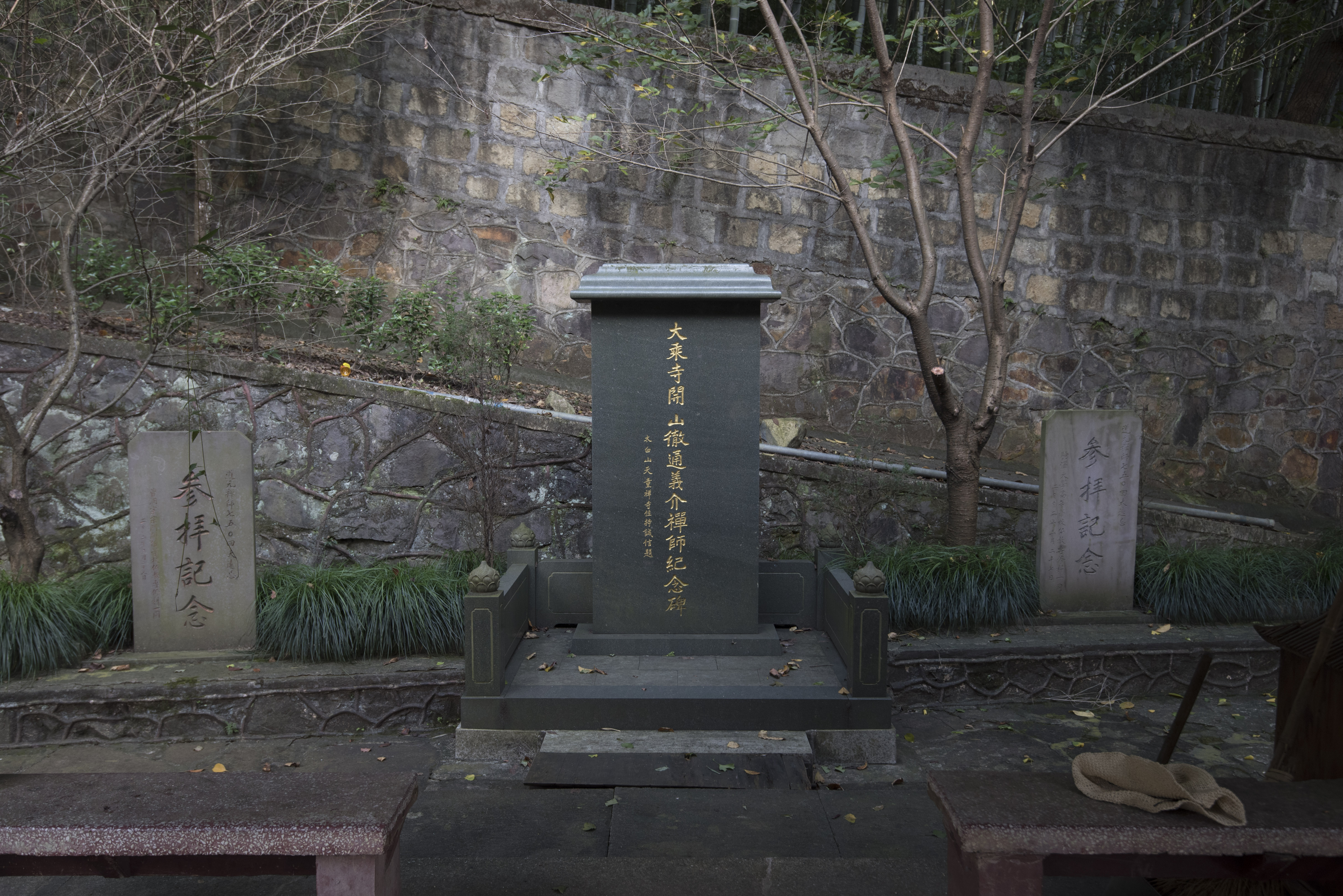 宁波天童寺